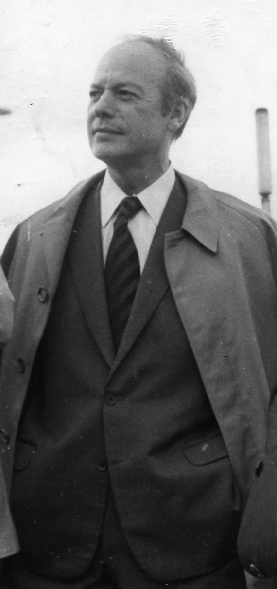 Photo Pierre Sudreau